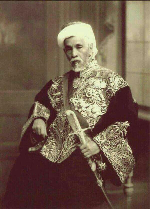 علي باشا بن عبدالله بن محمد بن عون